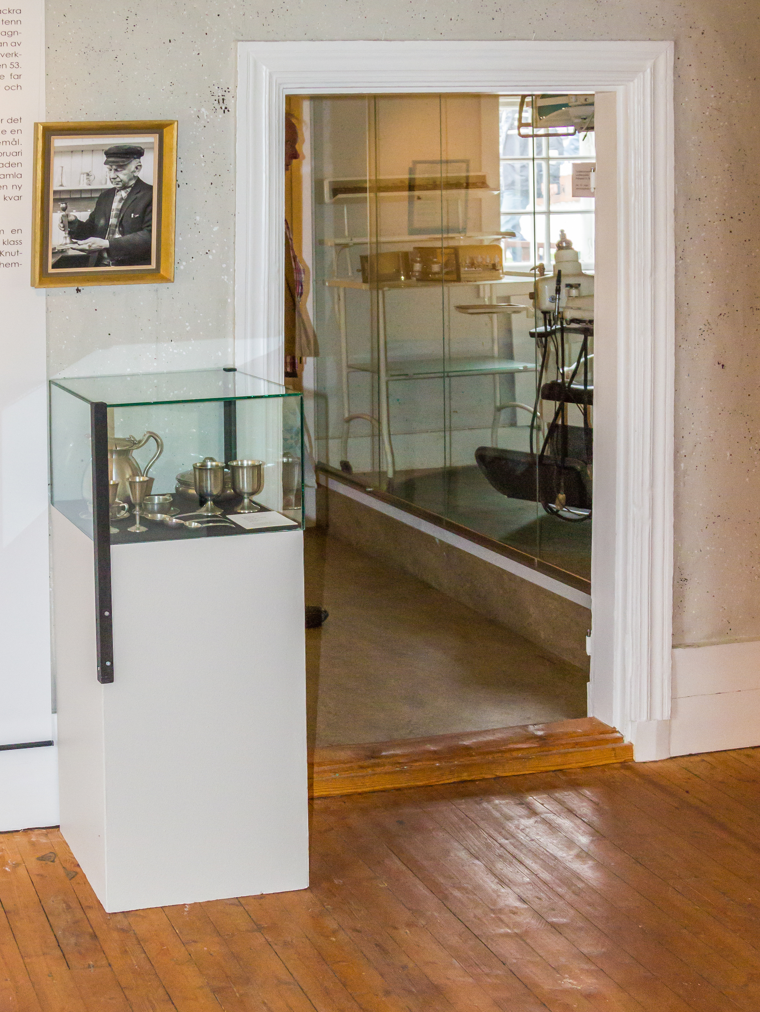 Grenna museum, Gränna, Jönköpings kommun, Jönköpings län, Sverige. I förgrunden en monter med tennsaker från Gränna Tenn och ett porträtt av formgivaren och tenngjutaren Thorild Knutson.